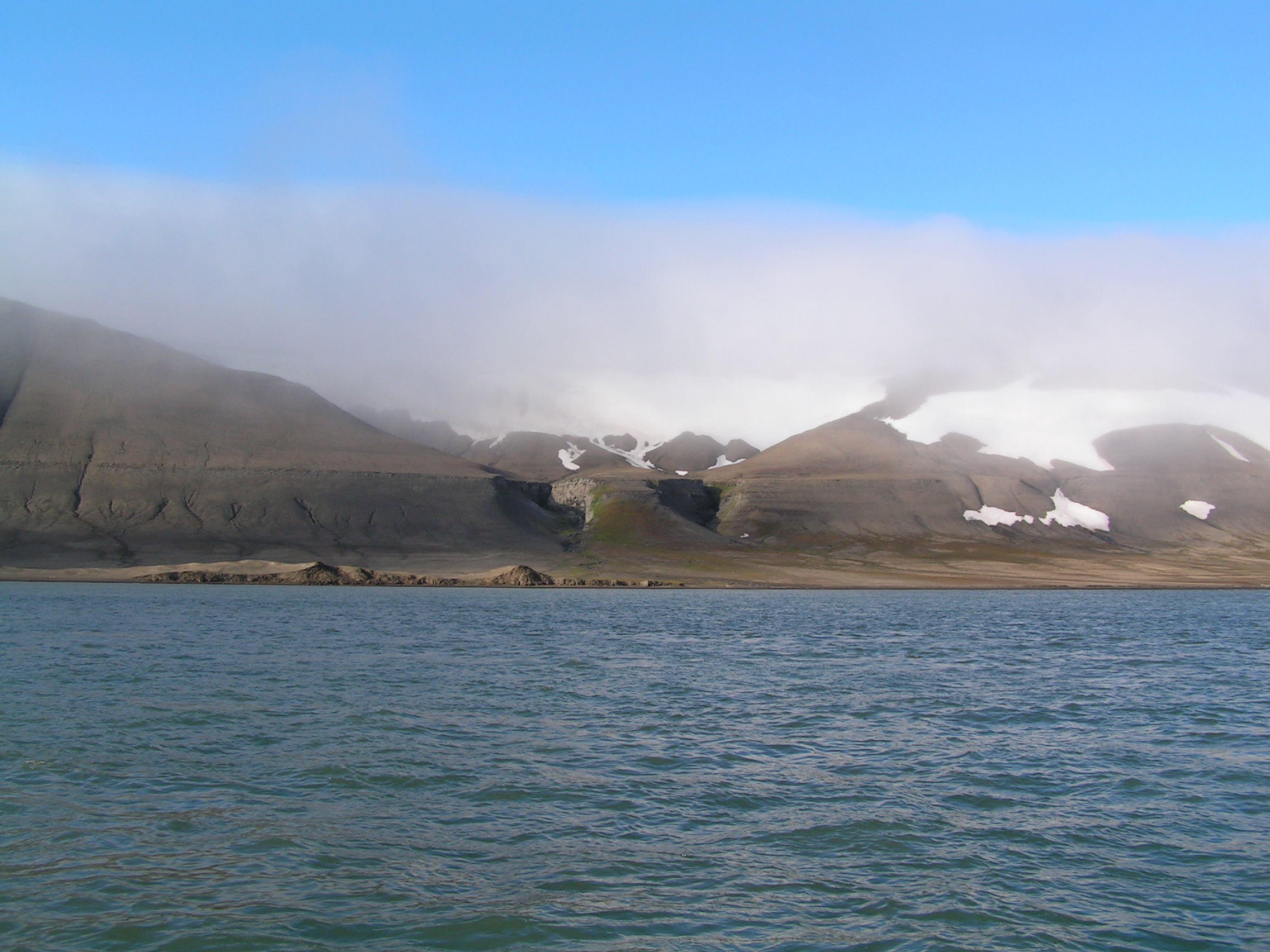 Freeman strait, between Barents island and Edge island